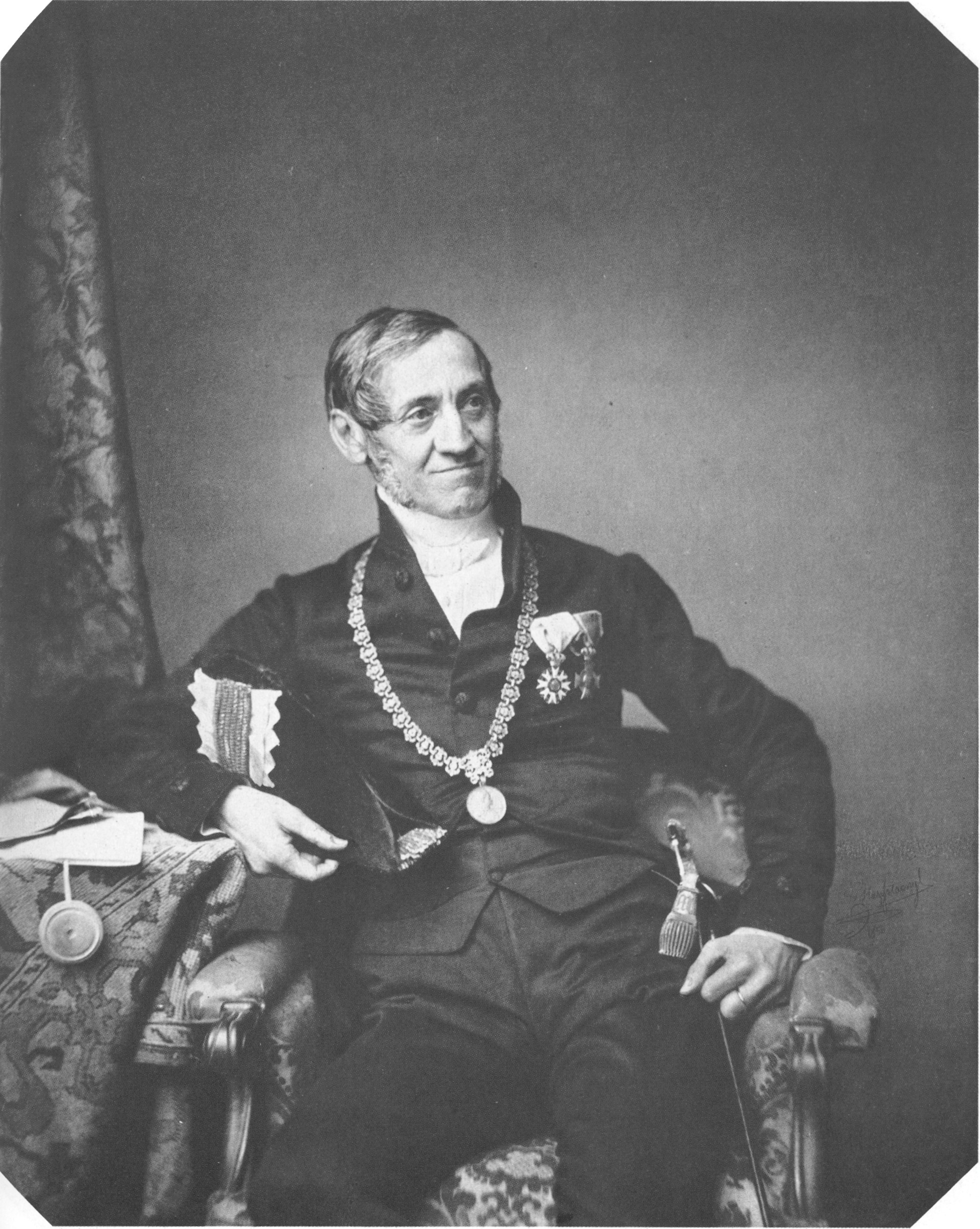 Kaspar Ritter von Steinsdorf (1797-1879)